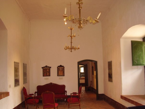 Salón de la Casa de los Marqueses del Valle de Tojo, Yavi, Jujuy. Monumento Histórico Nacional.